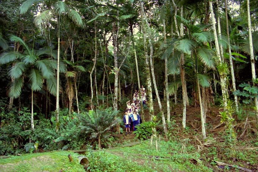 Estudantes na trilha interpretativa da RPPN Santuário Rã-bugio - Guaramirim SC